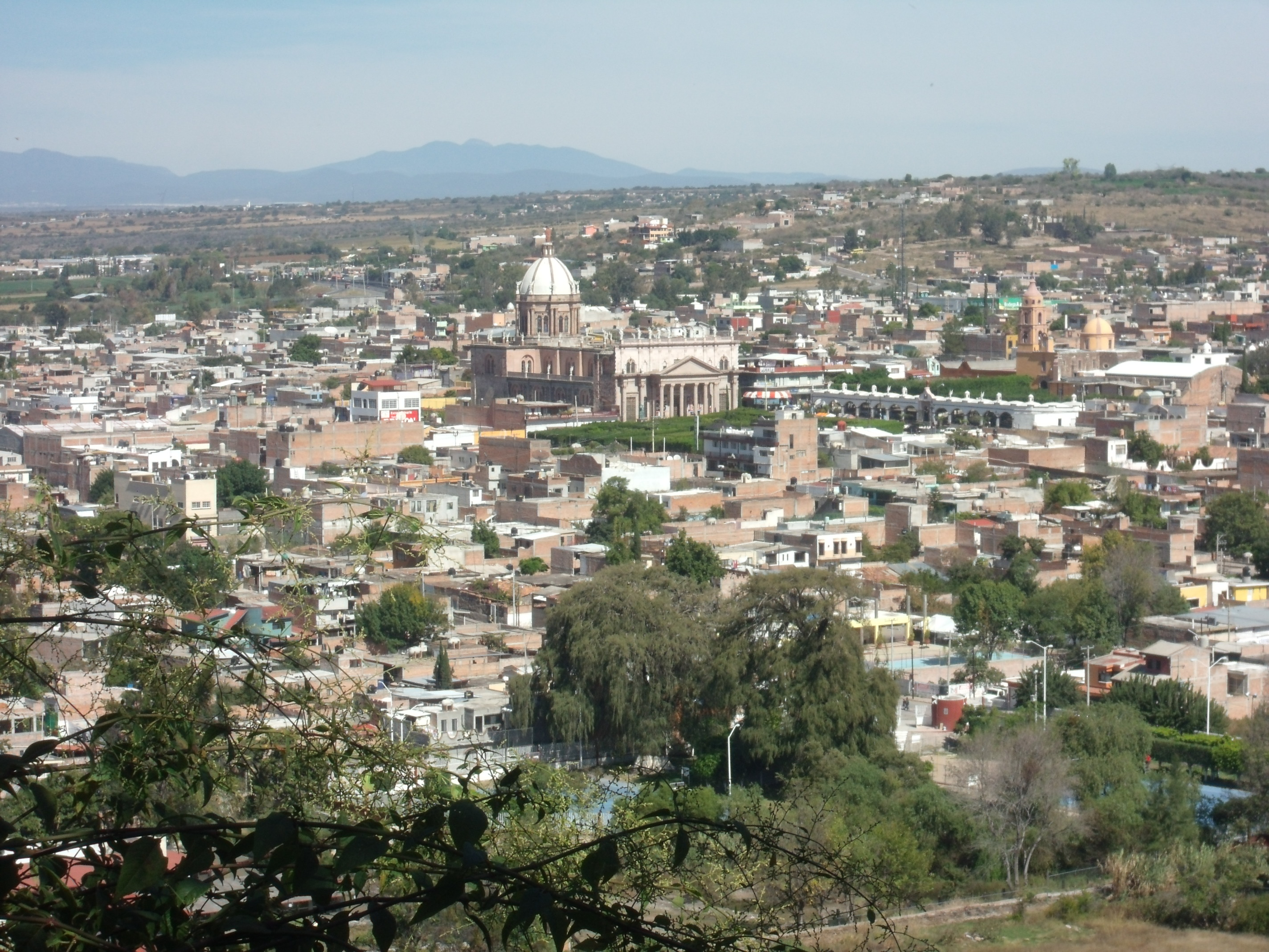 Vista panóramica del municipio de Apaseo el Alto, Gto.